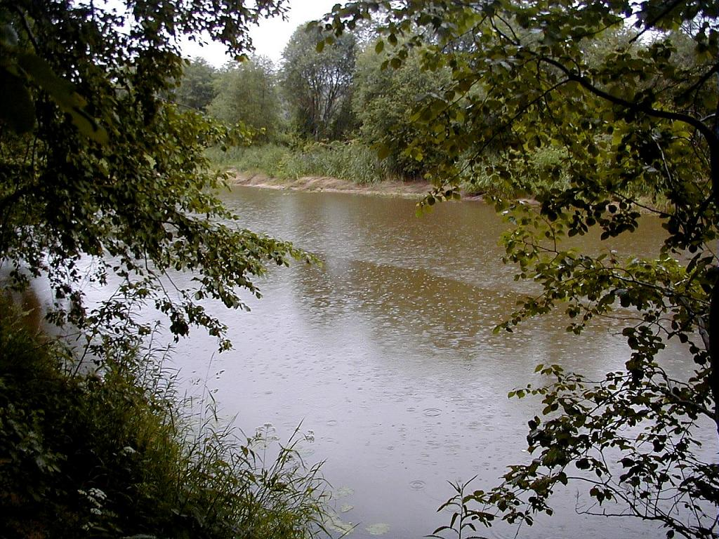 Abava pie Mazrendas 2002-06-23